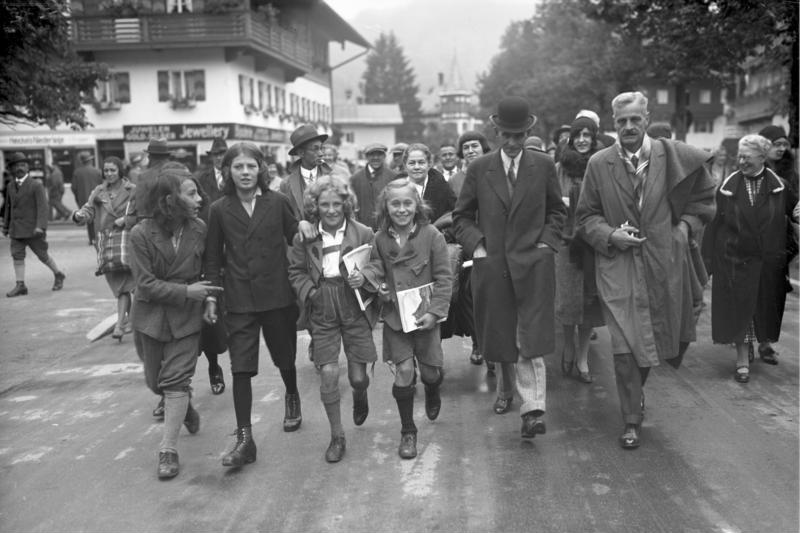 Der amerikanische Automobilkönig Henry Ford bei den Passionsspielen in Oberammergau! Henry Ford begibt sich in Begleitung seiner Freunde und der Oberammergauer Jugend zum Passionsspieltheater.